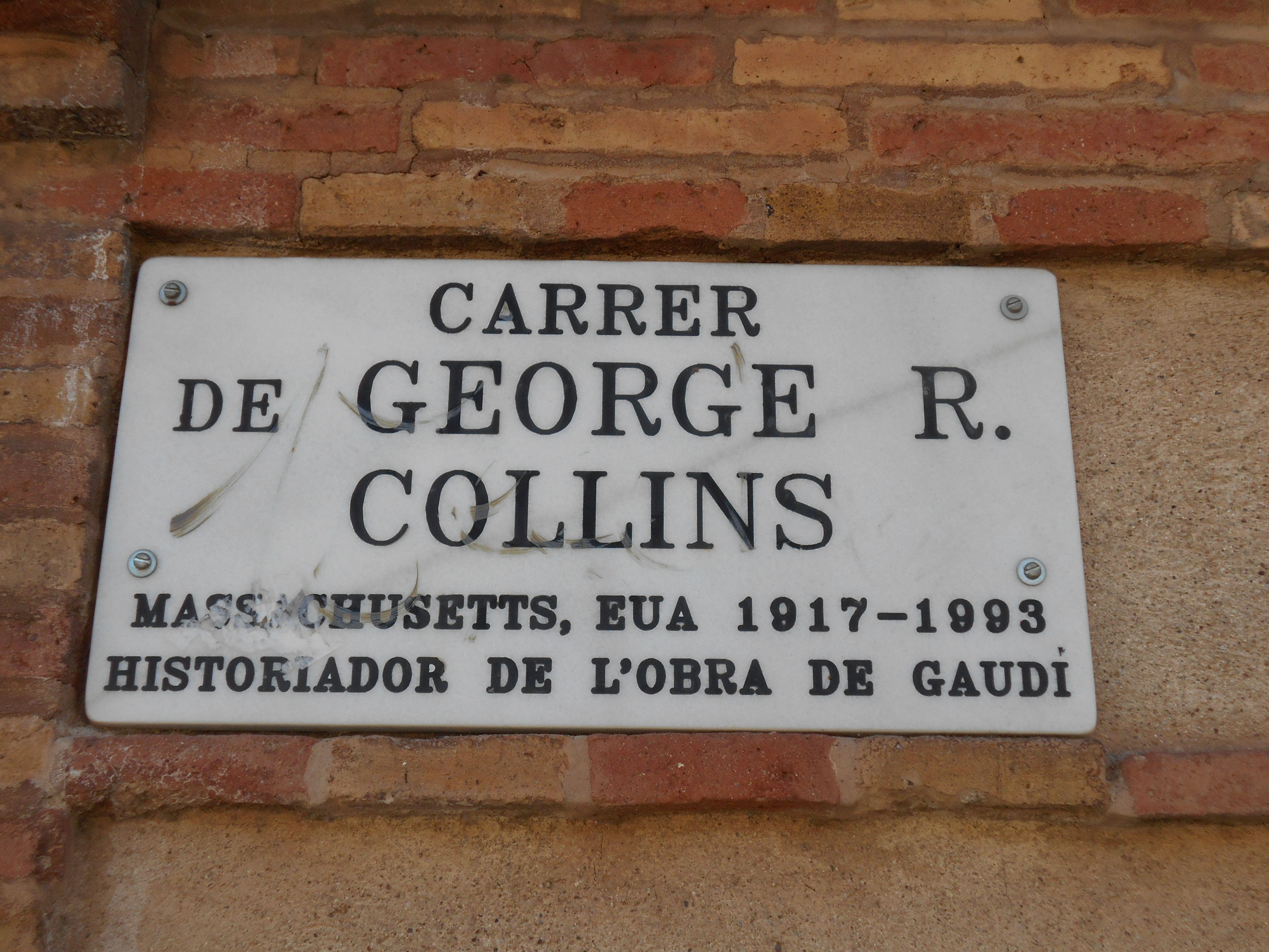 Calle de George R. Collins.